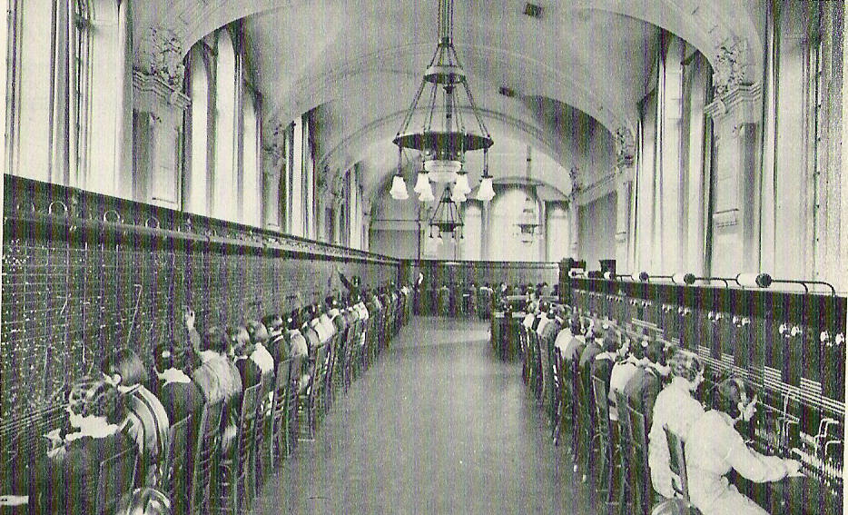 Manuell telefonstation i Malmö 1934